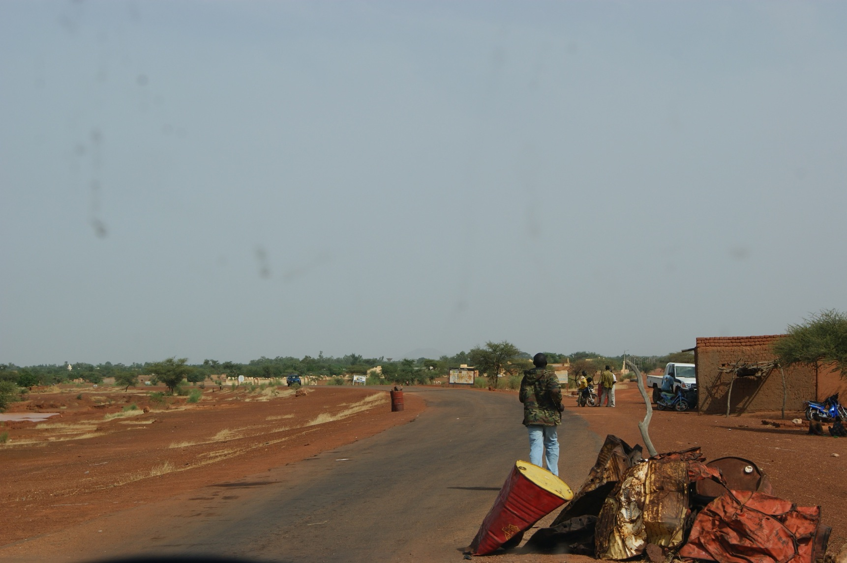 The road to Timbuktu, Mali